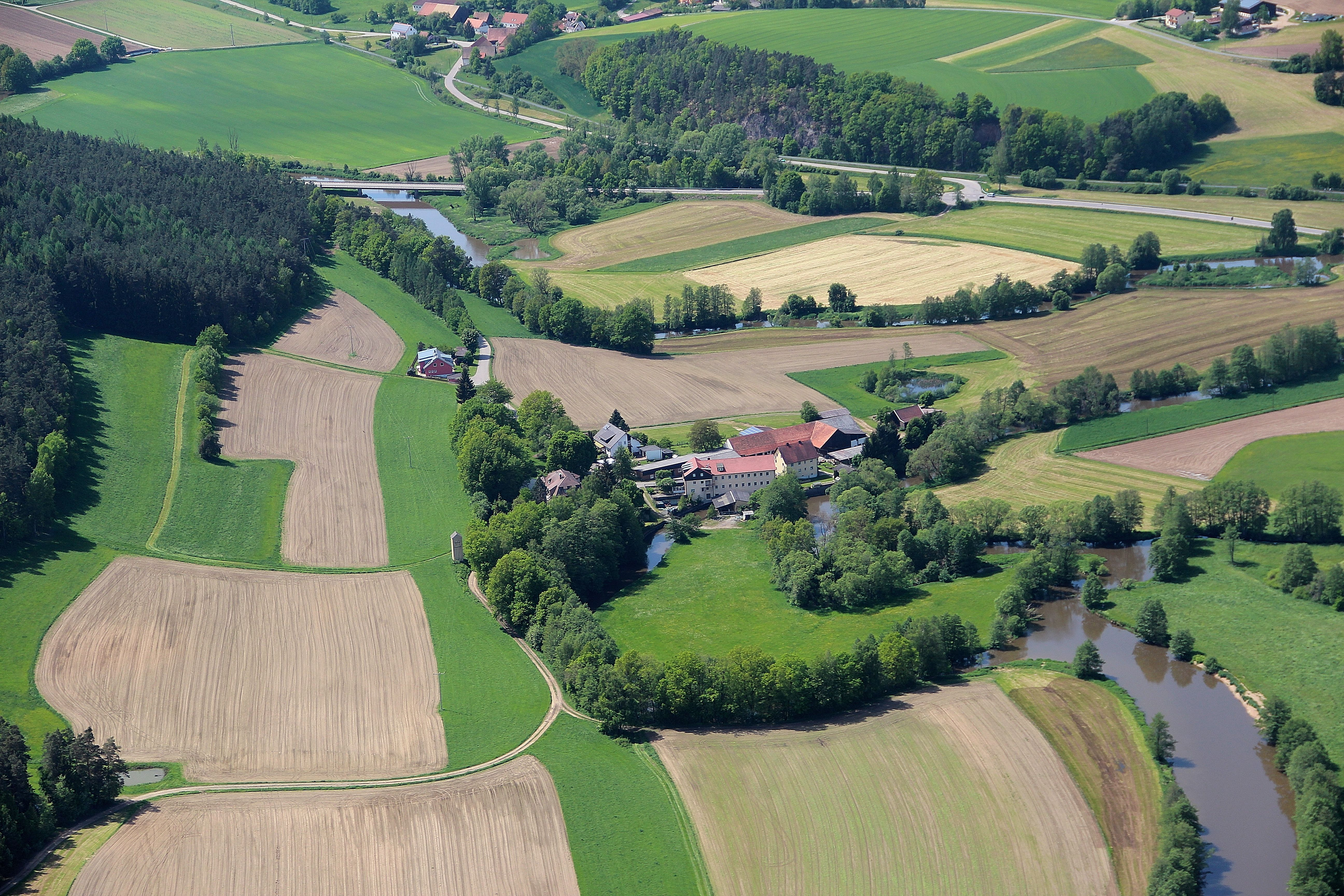 Die Furthmühle am Fluss Schwarzach bei Altfalter; am oberen Bildrand Oberwarnbach (Gemeinde Schwarzach bei Nabburg, Landkreis Schwandorf, Oberpfalz, Bayern)